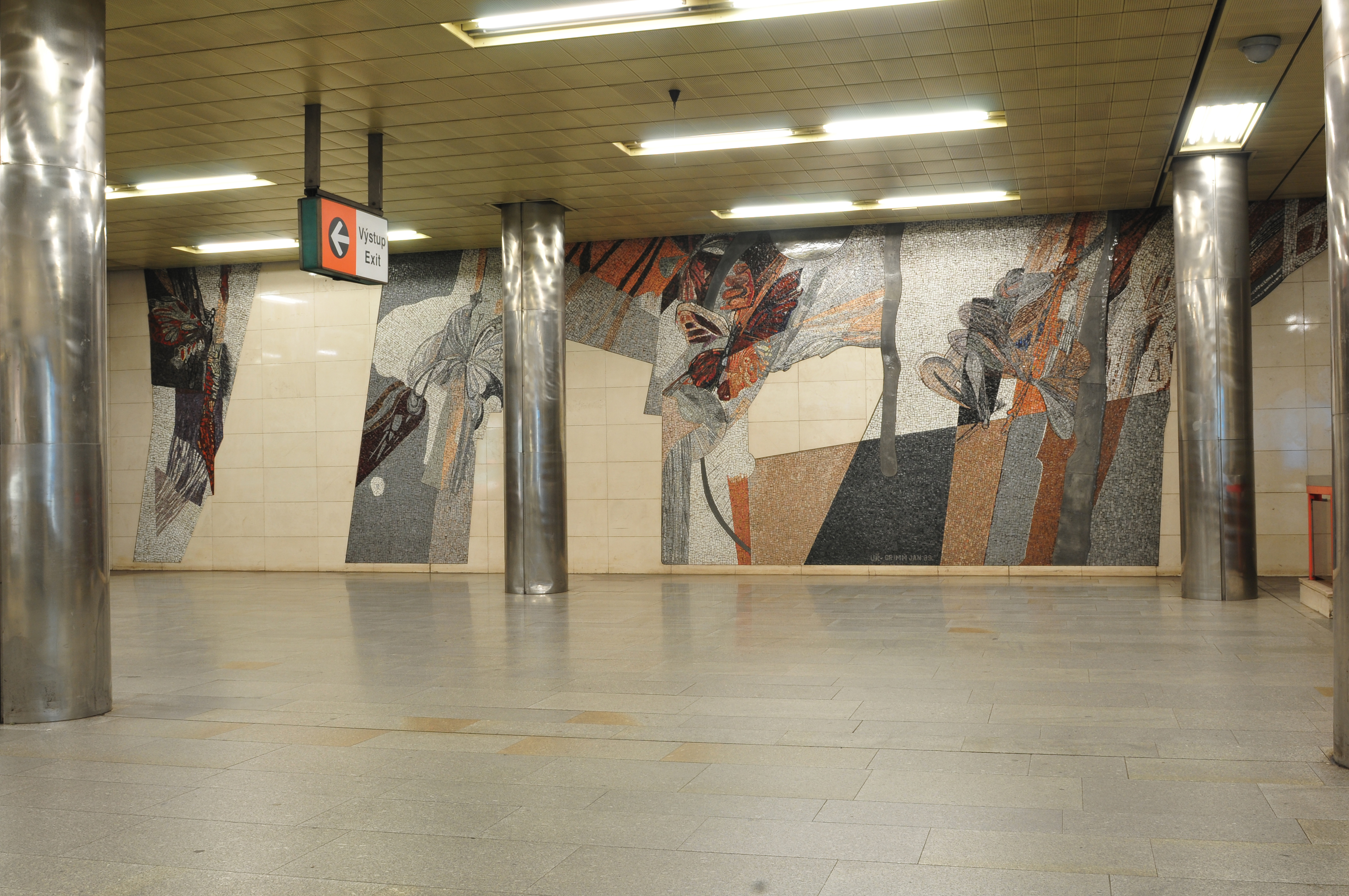 Metro Praha